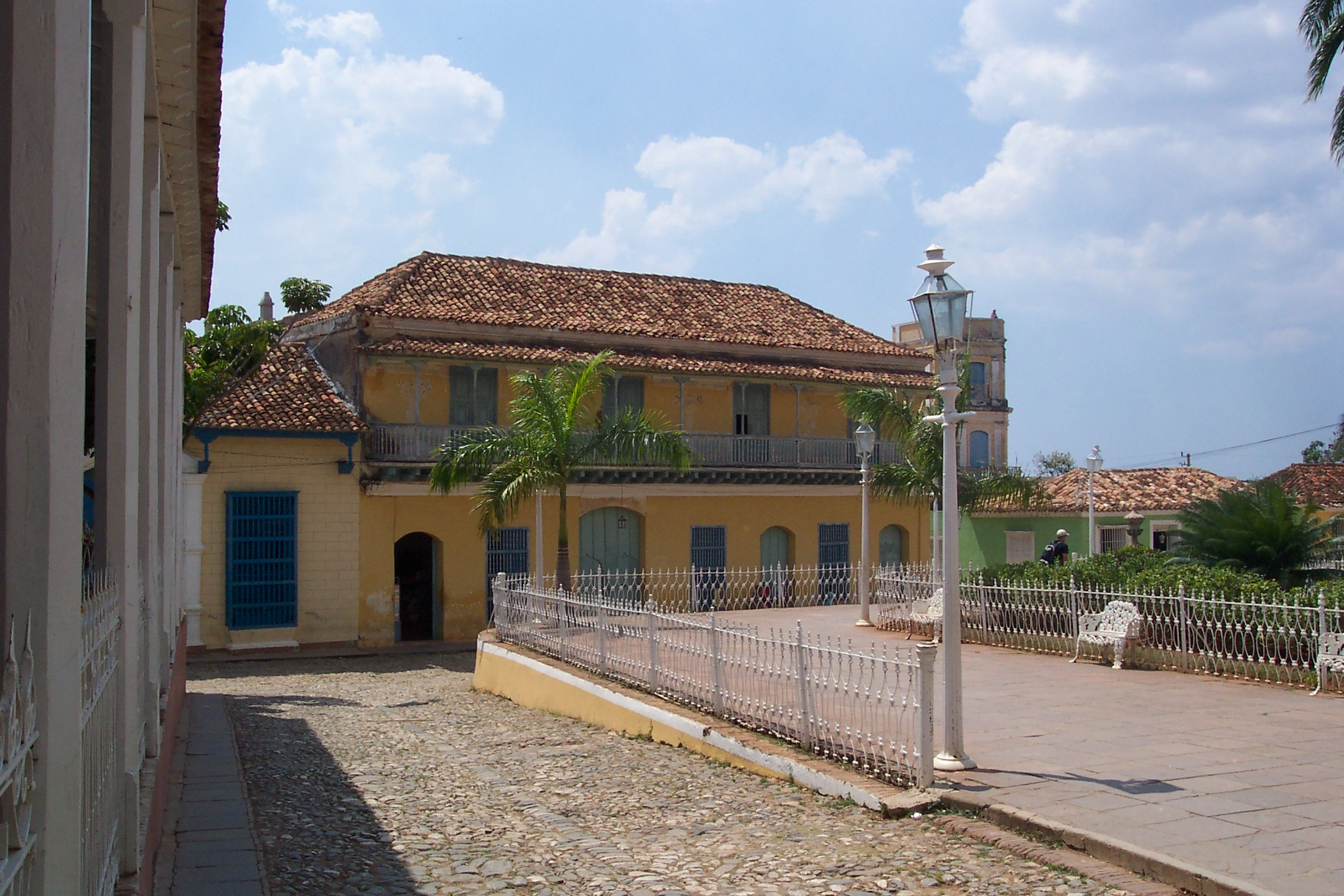 Casa de Aldemán Ortiz, Trinidad, Cuba